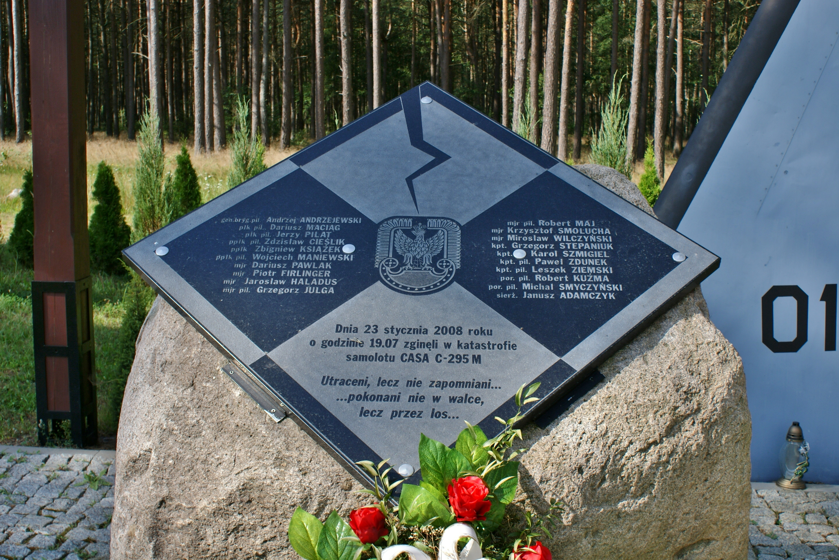 MIROSŁAWIEC – pomnik ofiar katastrofy samolotu CASA. Wojskowy samolot transportowy CASA C-295M należący do 13 eskadry lotnictwa transportowego w Krakowie 23 stycznia 2008 r. kilka minut po godzinie 19 rozbił się podczas podejścia do lądowania w pobliżu lotnisko wojskowego w Mirosławcu. W wyniku katastrofy wszyscy znajdujący się na pokładzie samolotu ponieśli śmierć - 4 członków załogi z 13 eskadry lotnictwa transportowego oraz 16 wysokich rangą oficerów, głównie z 1 Brygady Lotnictwa Taktycznego w Świdwinie. Żołnierze wracali z Warszawy z Konferencji Bezpieczeństwa Lotów Lotnictwa Sił Zbrojnych…